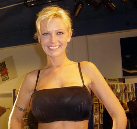 Vivian Schmitt bei einem Promo-Auftritt in Wuppertal (Februar 2006). Bild von DarkwingDE.